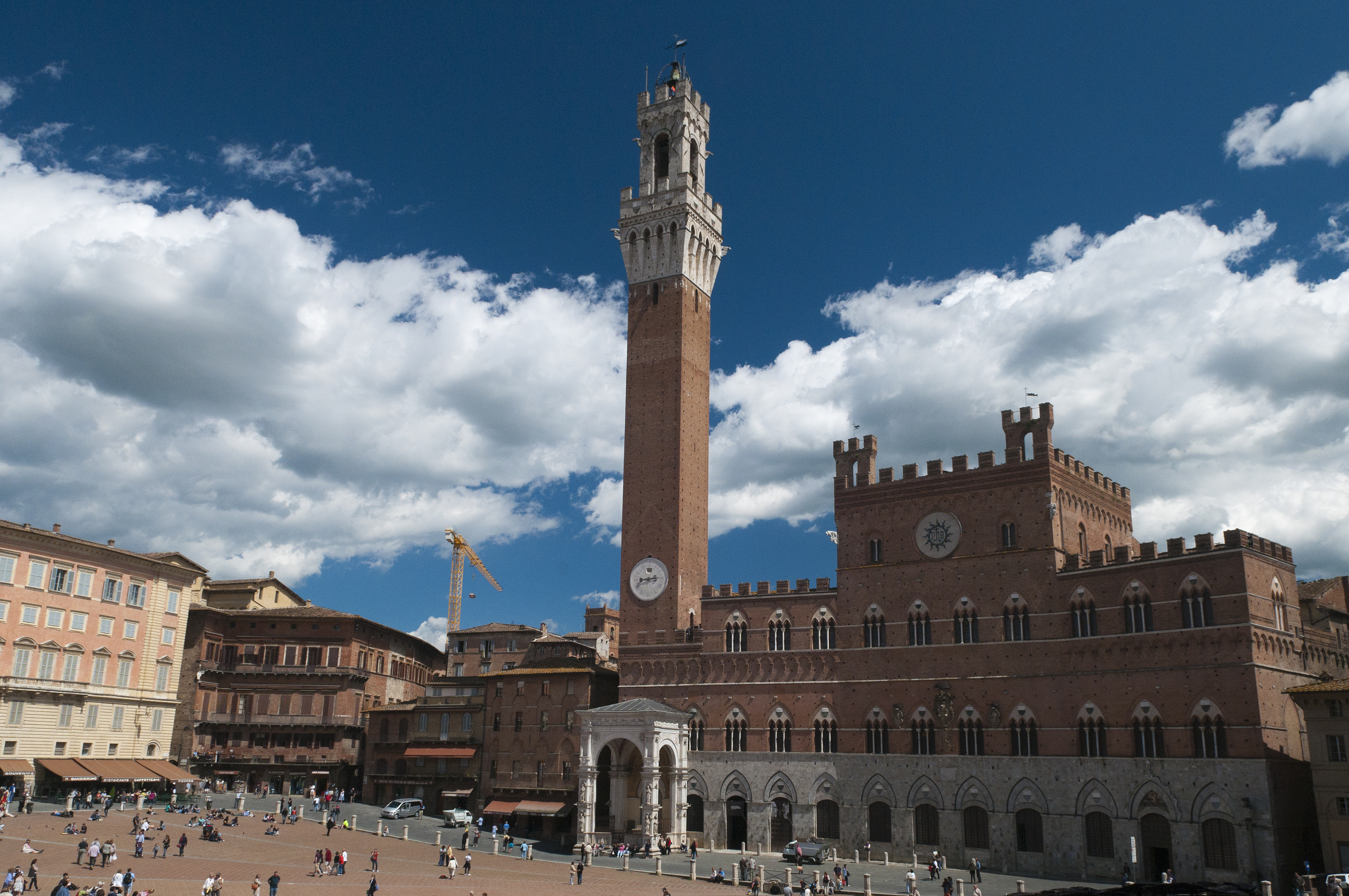 Palazzo Pubblico (Siena) (Piazza del Campo) with tower Torre del Mangia, Tuscany.